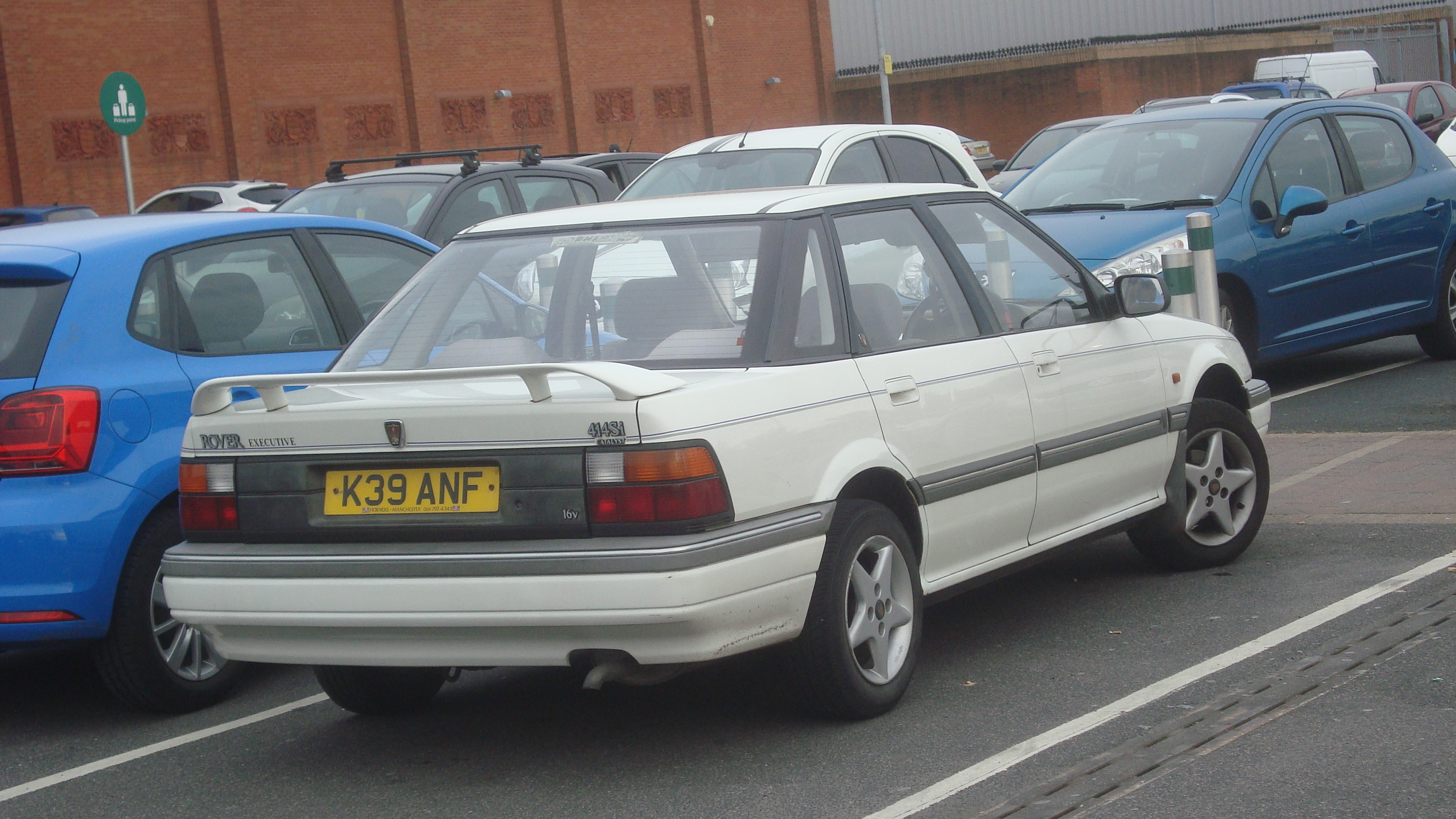 1993 Rover 414 Si